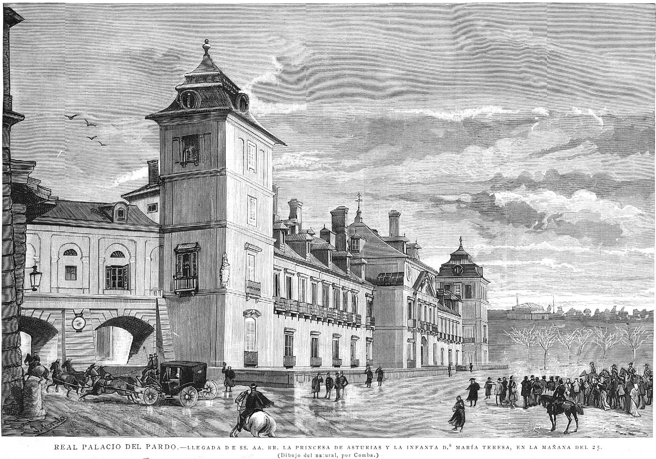 Real Palacio del Pardo. Muerte de Alfonso XII, llegada de SS. SS. RR. la princesa de Asturias y la infanta D.ª María Teresa, en la mañana del 25 de noviembre de 1885, grabado publicado en la revista española La Ilustración Española y Americana.